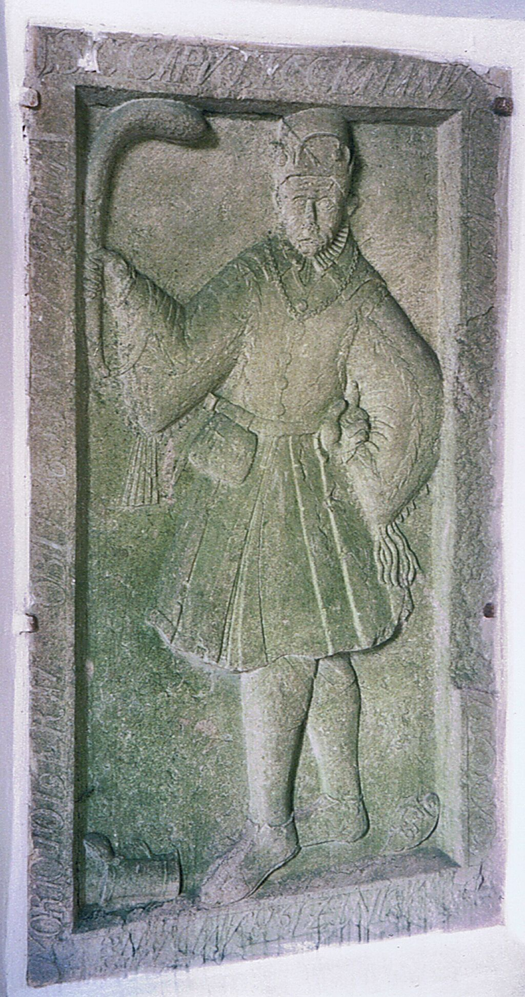 Sowno (powiat stargardzki) - płyta pamiątkowa w kościele